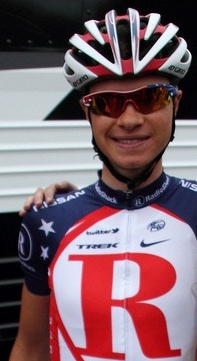 Ben King lors du Tour de Californie 2011